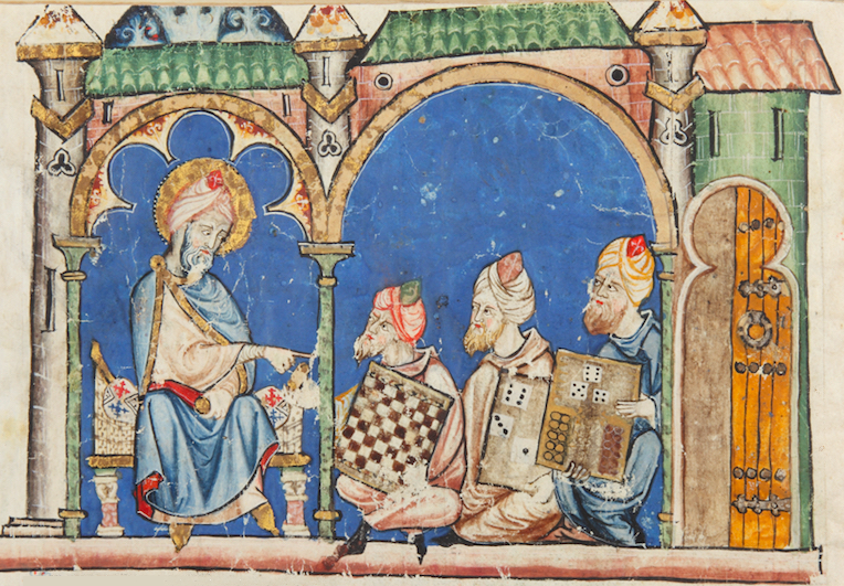 Darstellung der Spiele Schach, Backgammon und eines Würfelspiels im Buch "Libro de los juegos", Auftraggeber: Alfons der Weise , fertiggestellt 1283